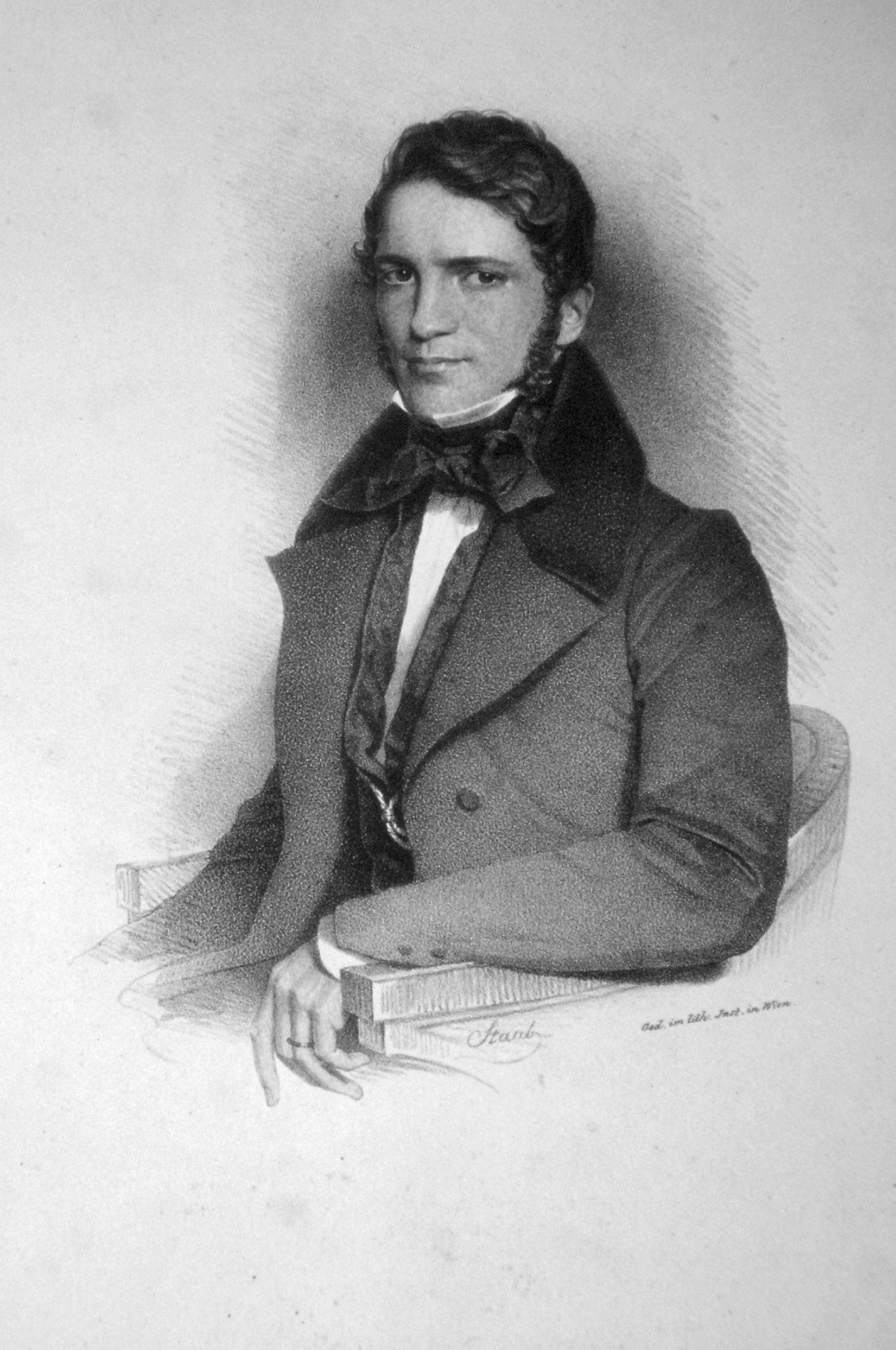 Hubert Ludwig Graf de la Fontaine und d'Harnoncourt-Unverzagt (1789-1846), k. k. Kämmerer, Ehrenritter des souveränen Maltheser-Ordens. Lithographie.